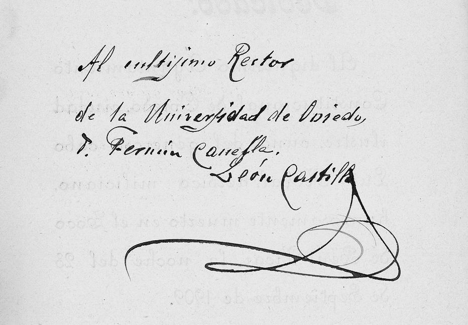 Dedicatoria del libro "Poesía de Guerra" al rector de la Universidad de Oviedo.